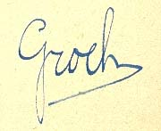 Eigene Arbeit Autogramm von Grock aus der Sammlung Udo Grimberg